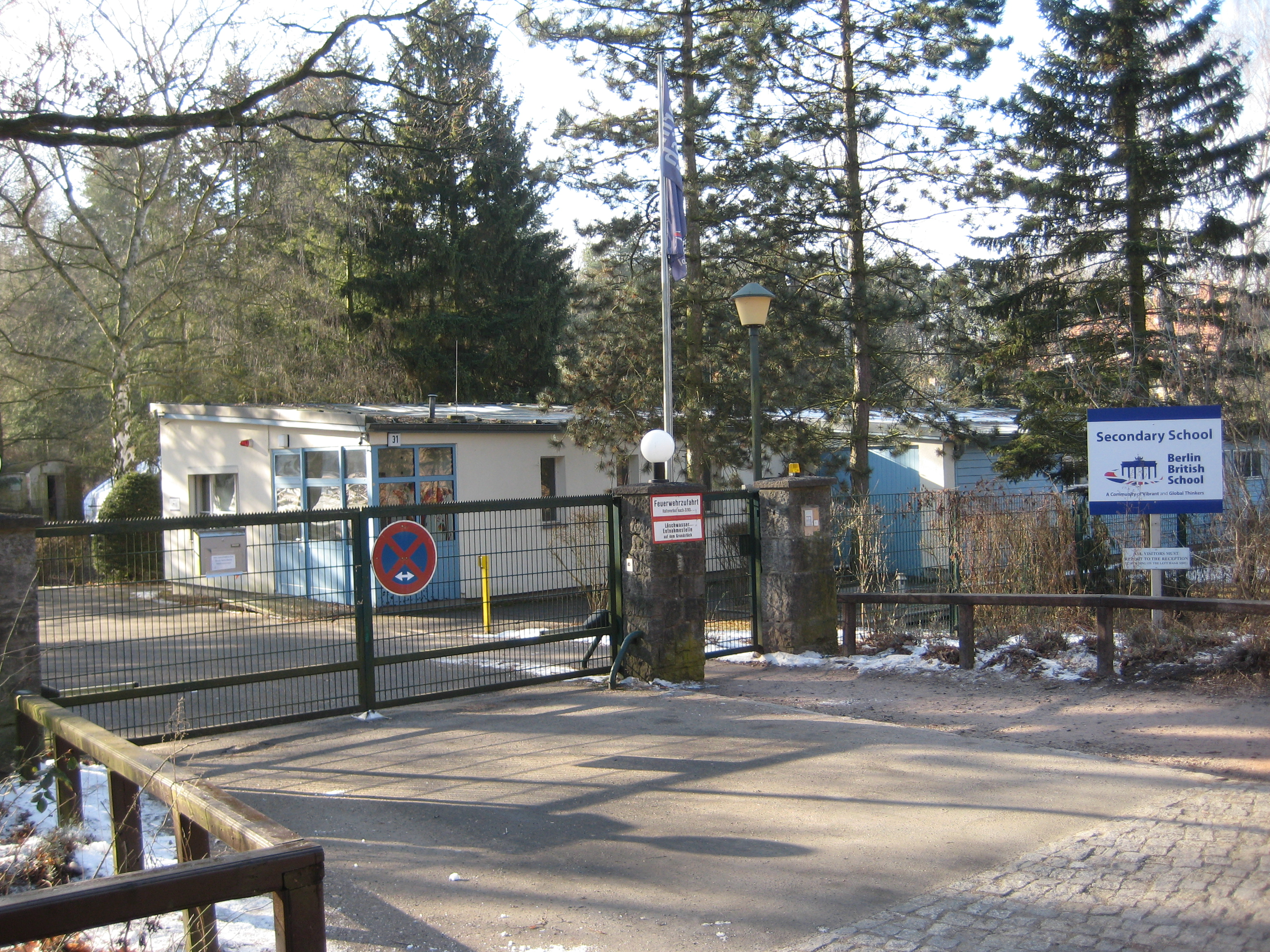 Berlin British Secondary School im Grunewald